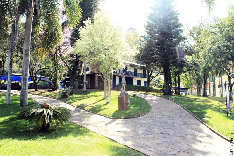 Entrada principal do Memorial - Atílio Fontana, localizado na cidade de Concórdia(SC), antiga casa da Família Fontana nesta cidade do Oeste Catarinense.